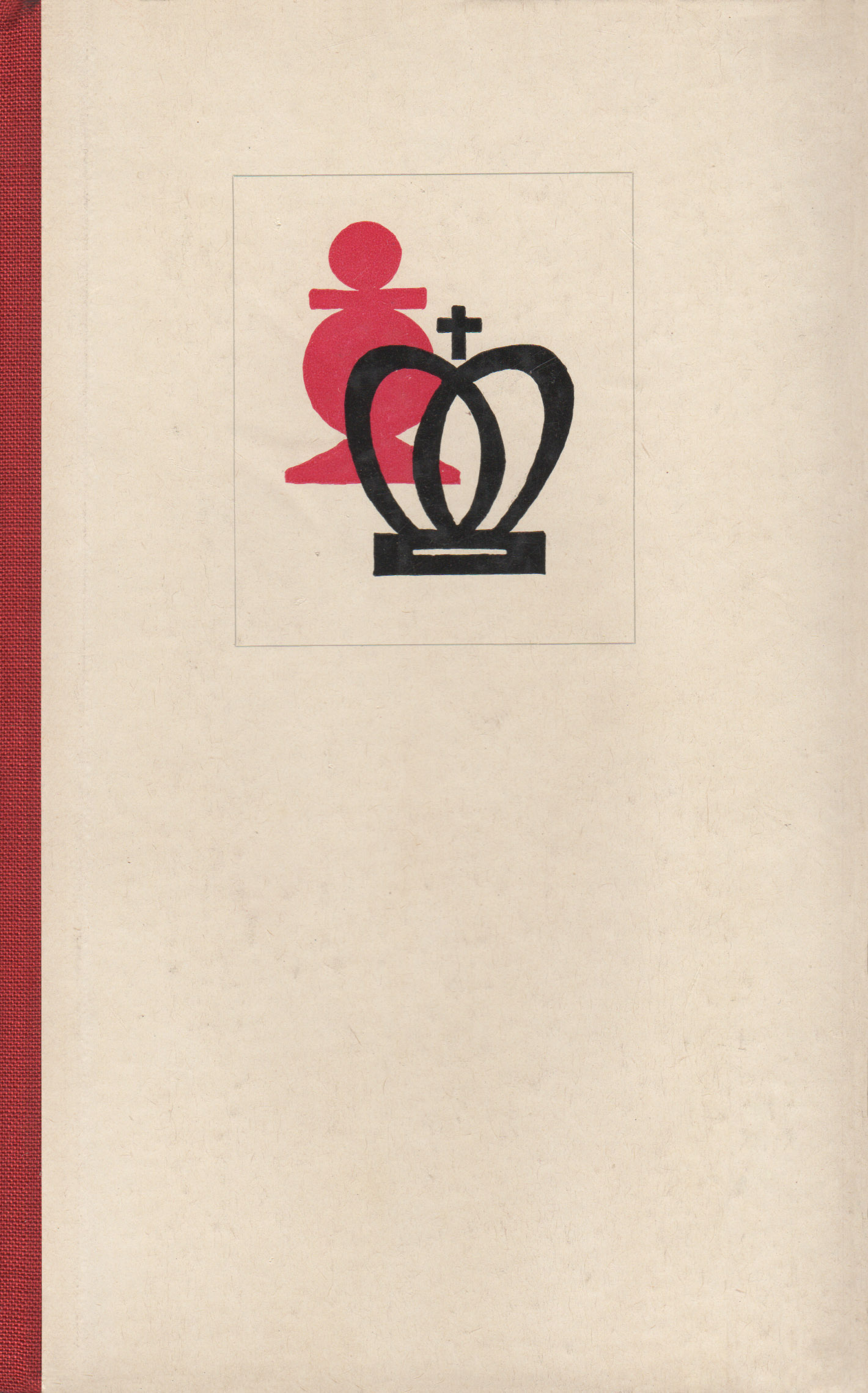 Sowjetische Sportliteratur, Lehrbuch der Endspiele, Autor J. Awerbach, übersetzt von Manfred Dittmar, Umschlagentwurf Peter Baarmann, Sportverlag Berlin 344 Seiten EVP 10,80 M